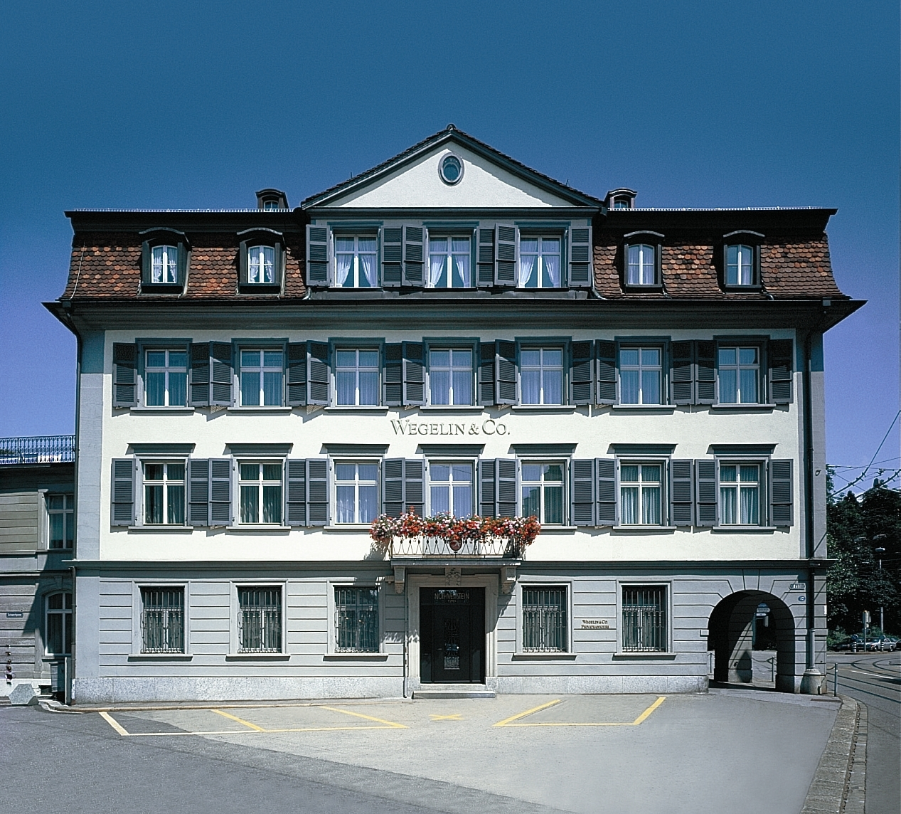 Bankhaus Wegelin & Co. in St. Gallen, Schweiz